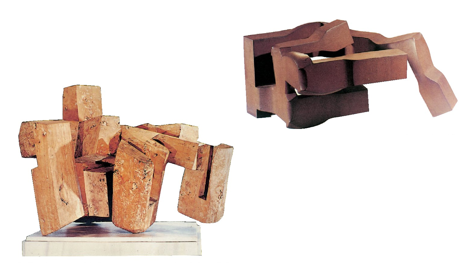 Eduardo Chillidaren bi lan. Eskuinean: “Toki”. Ezkerrean: “Abesti Gogorra”.